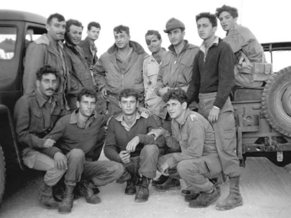 פעולת קלקיליה (מבצע "שומרון"). שלישי מימין (עומד) חבוש כובע, קצין המודיעין של חטיבה 202 גדעון מחניימי, במרכז מח"ט 202 סא"ל אריאל שרון. קיצוני שמאלי בשורת העומדים אברהם ארליך (אורלי) מ"פ ג' בגדוד 88, מימינו רס"ן מרדכי גור מג"ד 88. היתר אינם מזוהים.